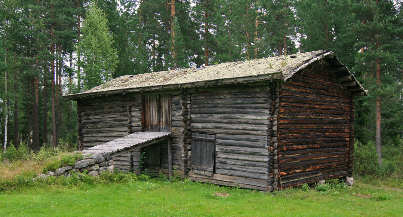 Låve fra Rundhaugen, Grue Finnskog. I dag på Glomdalsmuseet, Elverum.